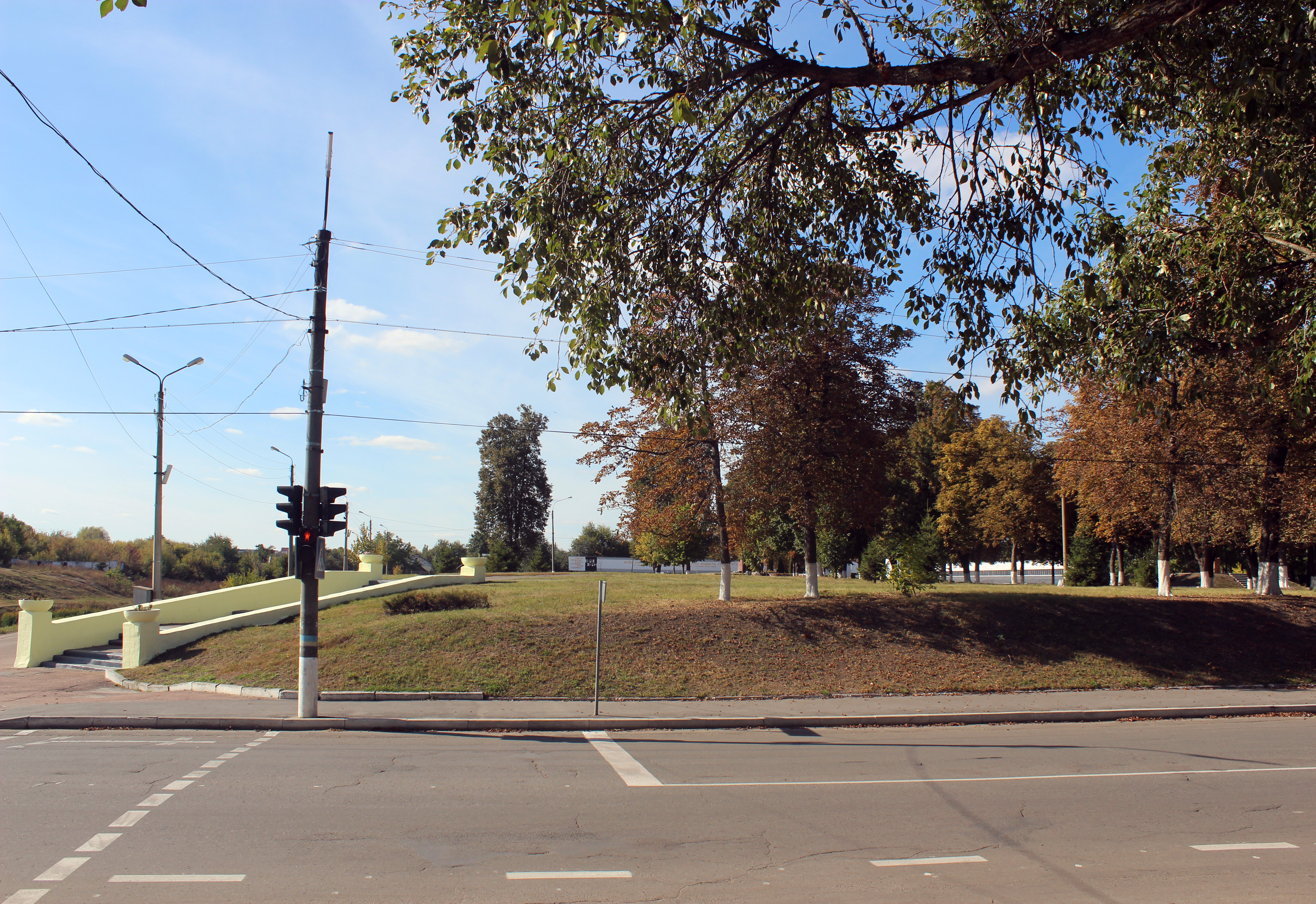 Меморіальний комплекс «Вічна Слава», Конотоп, вул. Братів Лузанів (Братів Радченків), 33, парк